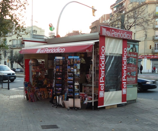 Krantenkiosk, Avinguda Meridiana (El Periódico de Catalunya)